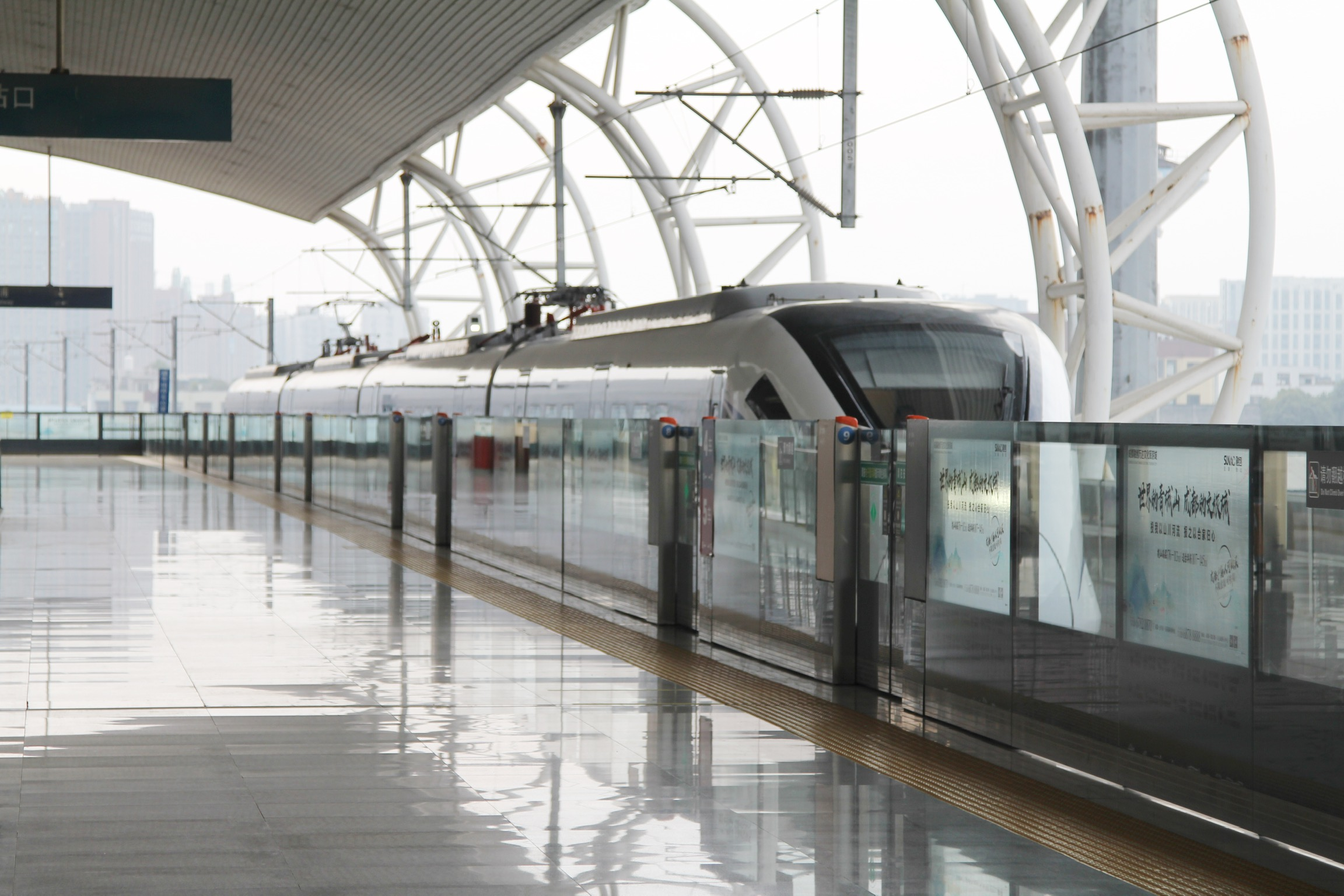 中文（中国大陆）: CRH6A-A 在犀浦站